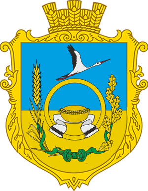 Герб с. Ободівка (Тростянецький район)